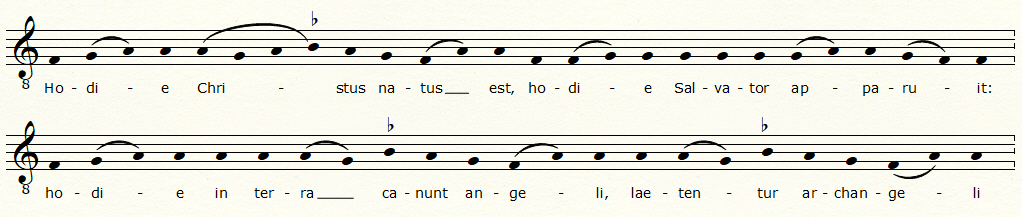 антифон 'Hodie Christus natus est' (транскрипция фрагмента)